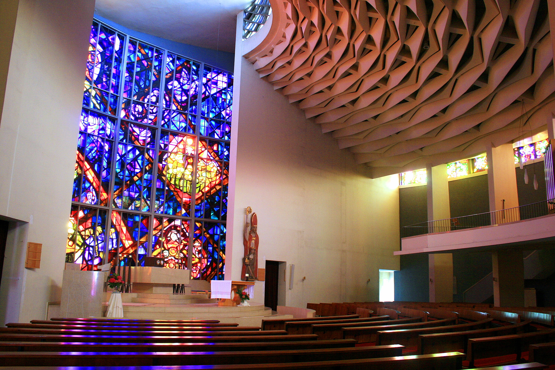 Kath. Pfarrkirche Gottessiedlung zur hl. Erentrudis in Herrenau mit Kloster